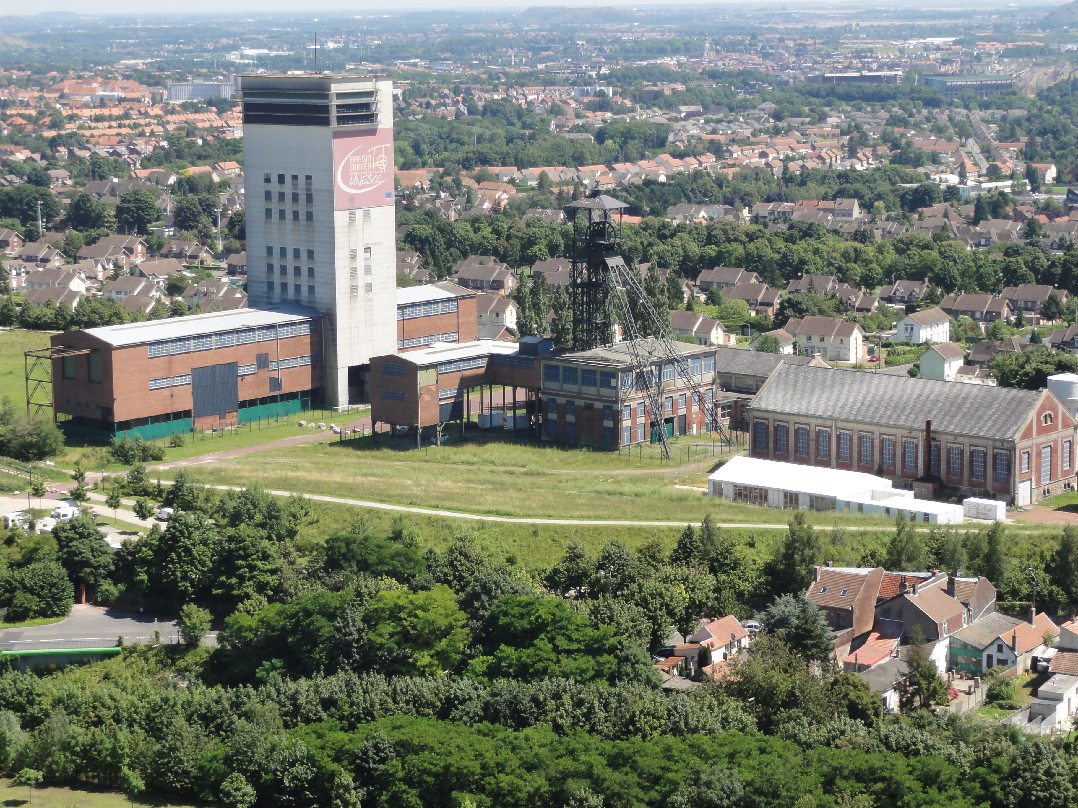 La fosse no 11 - 19 de la Compagnie des mines de Lens était un charbonnage du bassin minier du Nord-Pas-de-Calais constitué de deux puits situé à Loos-en-Gohelle, Pas-de-Calais, Nord-Pas-de-Calais, France. La fosse d'aérage no 11 bis est située sur un autre carreau. Les installations de surface de la fosse no 11 - 19 sont classées aux monuments historiques le 21 décembre 2009, venant remplacer l'inscription du 6 mai 1992. La fosse est également inscrite sur la liste du patrimoine mondial par l'Unesco le 30 juin 2012 et y constitue en partie le site no 63. It is indexed in the Base Mérimée, a database of architectural heritage maintained by the French Ministry of Culture, under the references PA00108467 and IA62000547 .